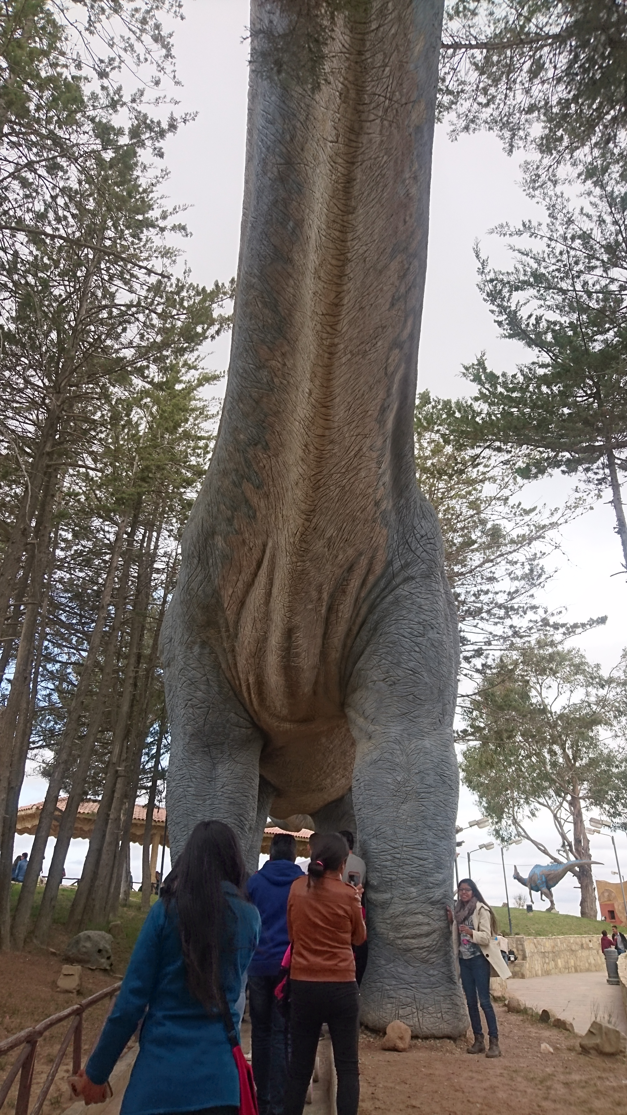 Cerro de Cal Orcko de la localidad de Quila Quila This medium shows the protected monument with the number H/00-238 in Bolivia.